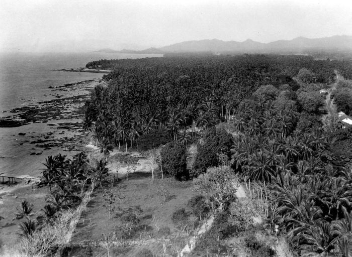 Negatief. Gezicht vanaf de vuurtoren van Anjer over het bij laag water drooggevallen koraalrif en het begin van de Grote Postweg